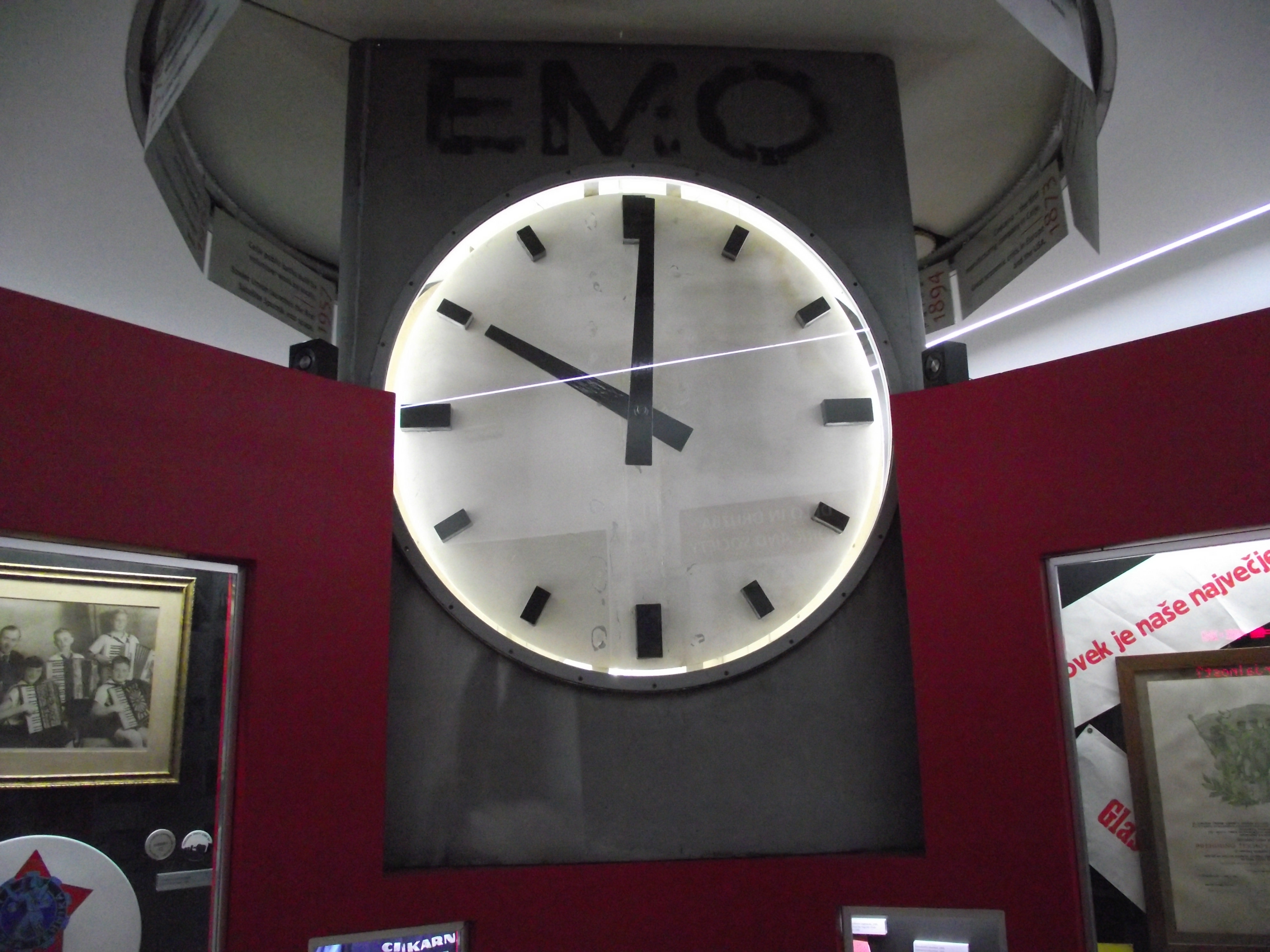 Celje